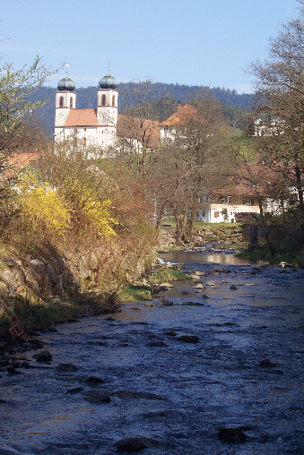 Fluss Wolf bei Schapbach